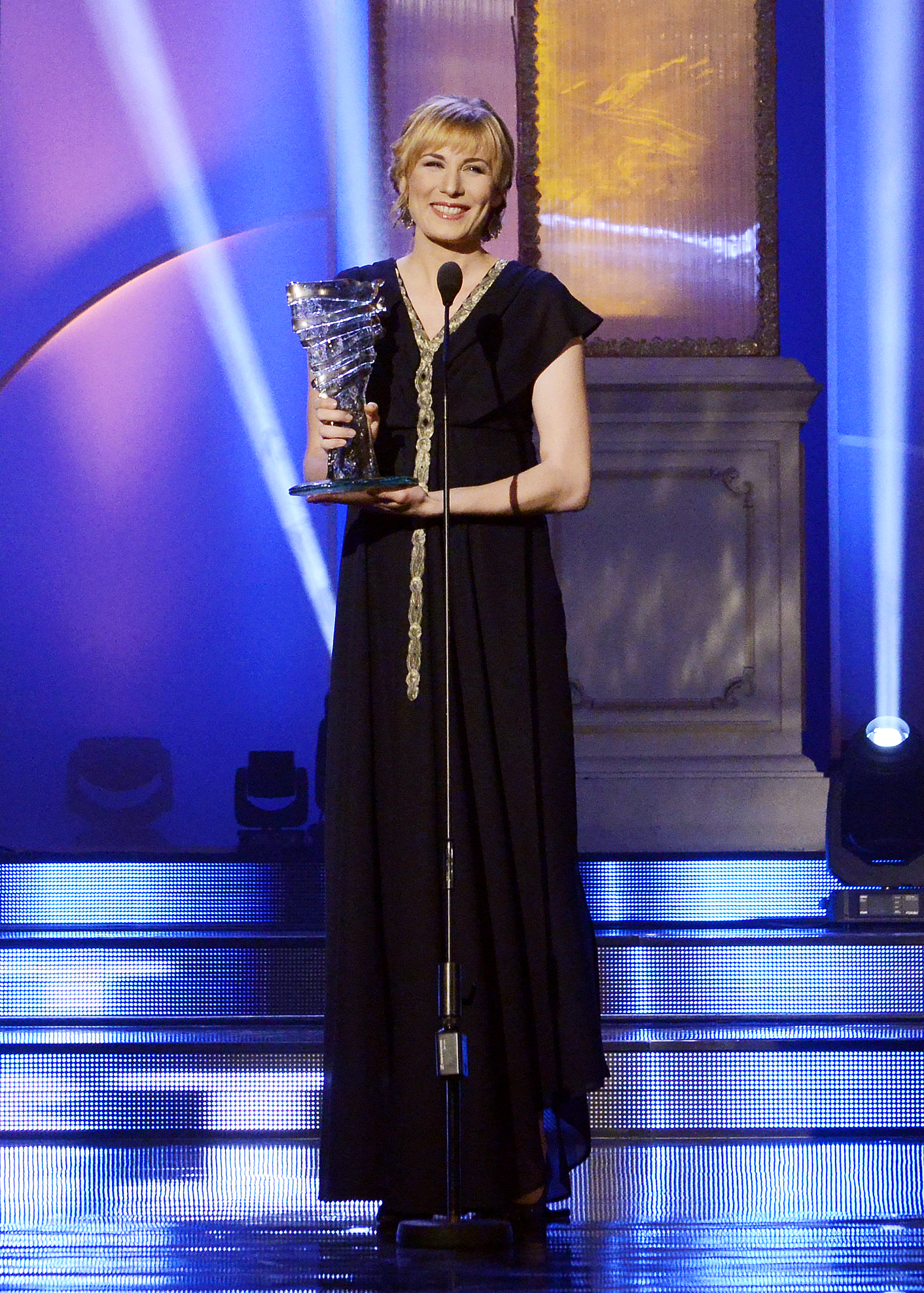 Anastasiya Kuzmina, Krištáľové krídlo 2015